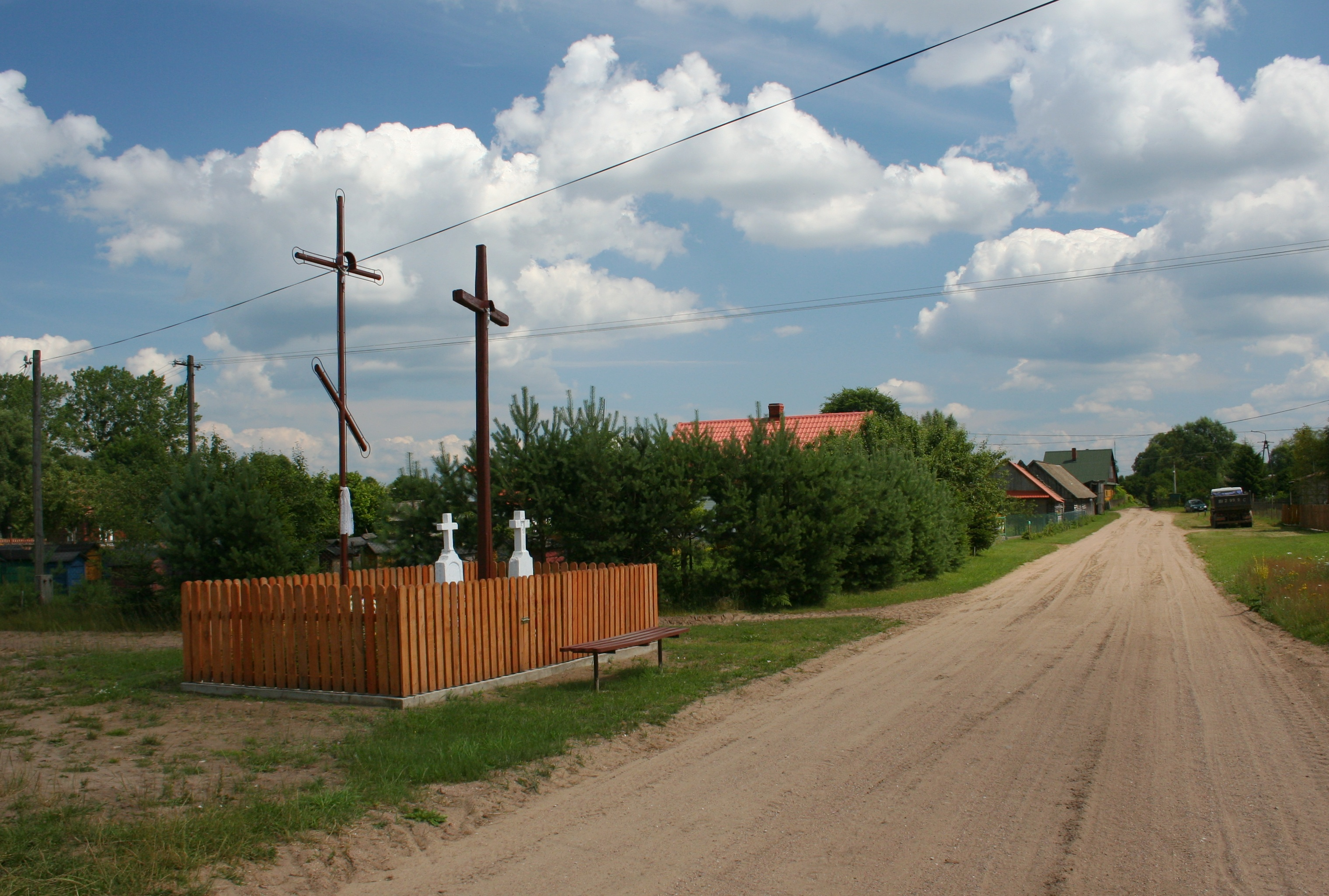 Fragment wsi Gorędy, gmina Narew, woj. podlaskie